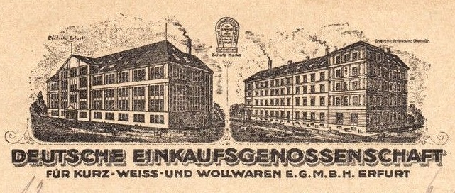 Briefkopf der Deutschen Einkaufsgenossenschaft für Kurz-, Weiß- und Wollwaren eGmbH in Erfurt